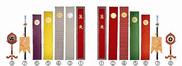 即位礼で使用された旛類 （①萬歳旛 ②日像纛旛 ③月像纛旛 ④菊花章大錦旛 ⑤菊花章中錦旛 ⑥菊花章小錦旛 ⑦桙 ⑧鉦 ⑨鼓）